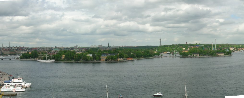 Skeppsholmen and Kastellholmen in Stockholm, Sweden